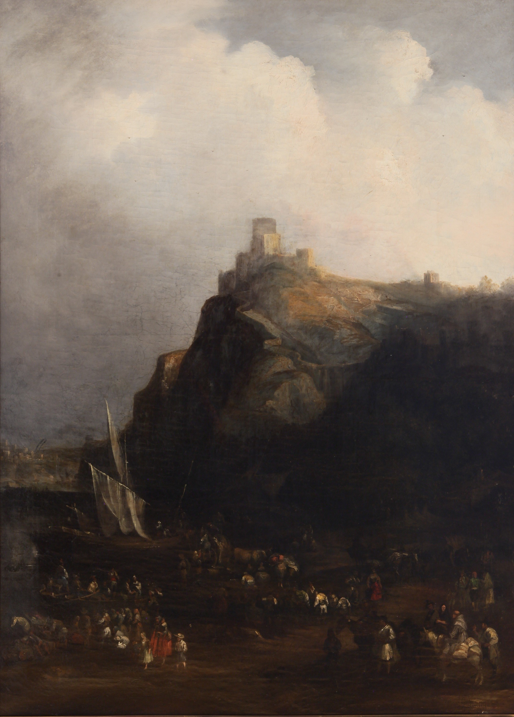 Jenaro Pérez Villaamil, El Castillo de Gaucin. 1838. 100,5 x 73,5 cm, con marco: 120,5 x 92,5 x 7 x 11 cm, nácar sobre tela. Inv. 2786.